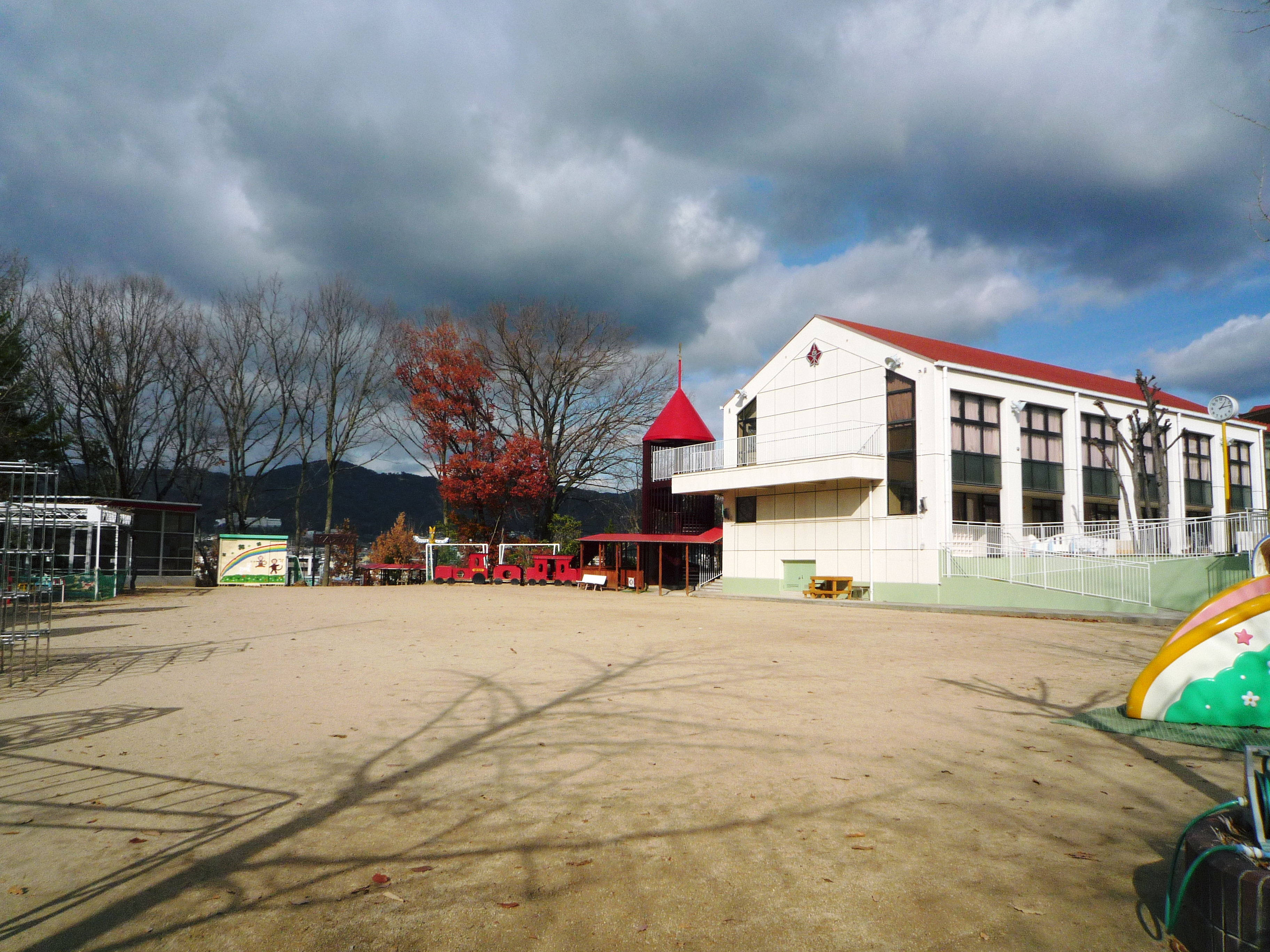 箕面自由学園幼稚園のグラウンド